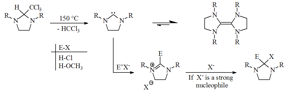 Wanzlick carbene